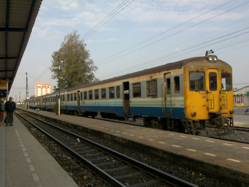 ขบวนรถไฟ สถานีรถไฟบุรีรัมย์